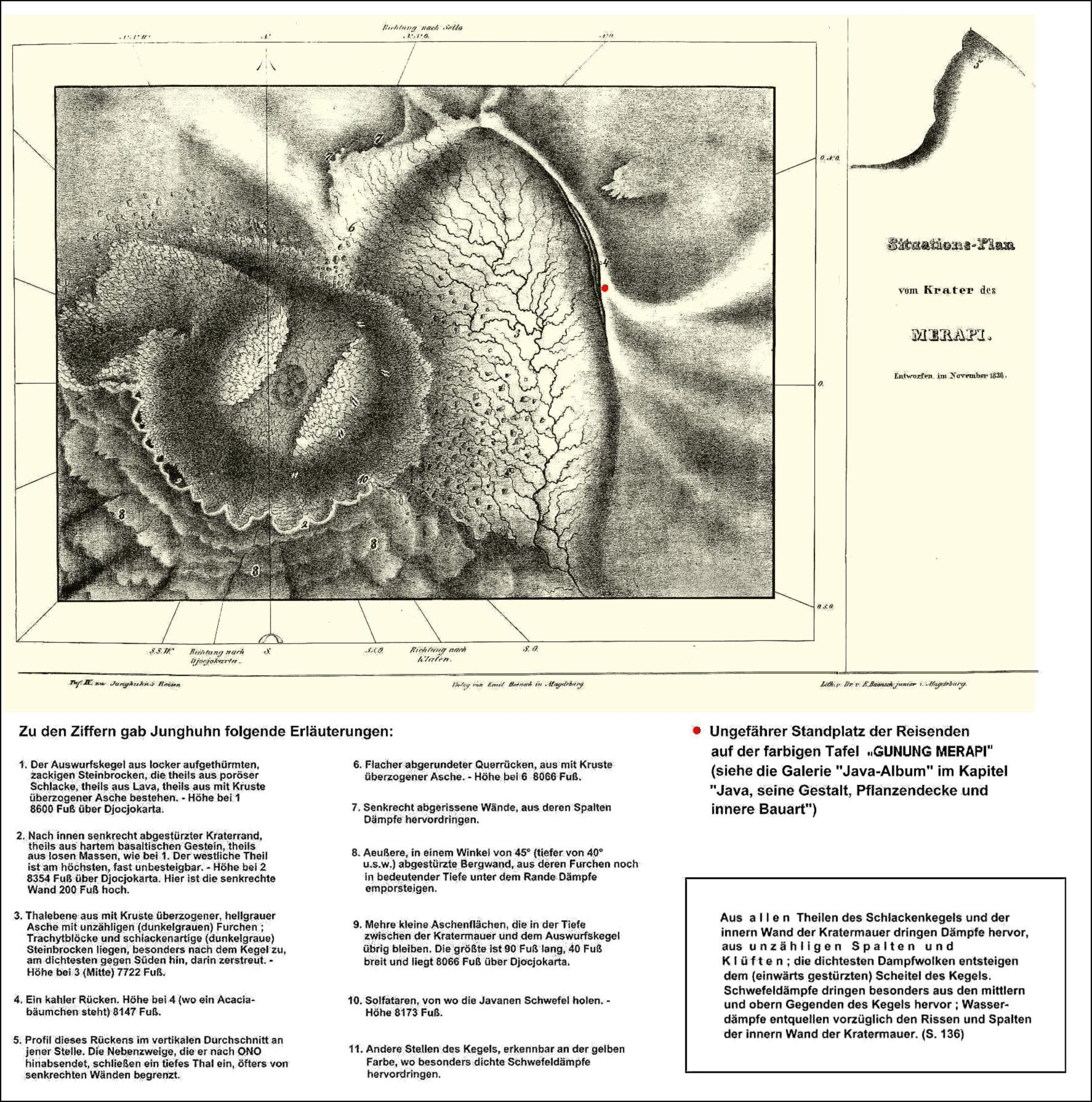 Grundriss vom Merapi